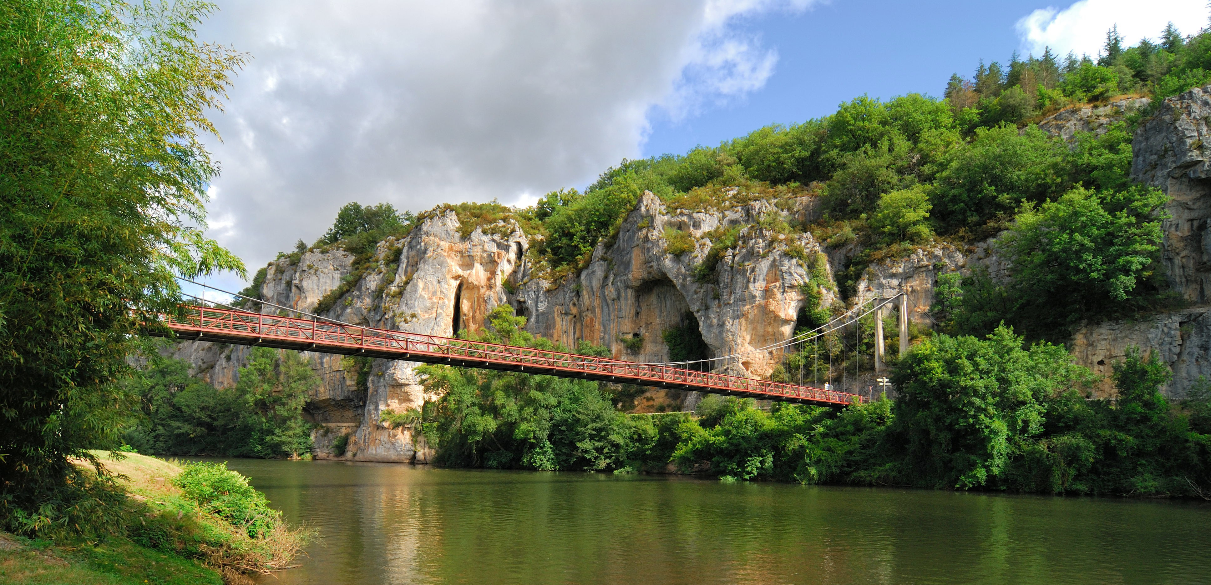 Pont suspendu sur la commune de Bouziès